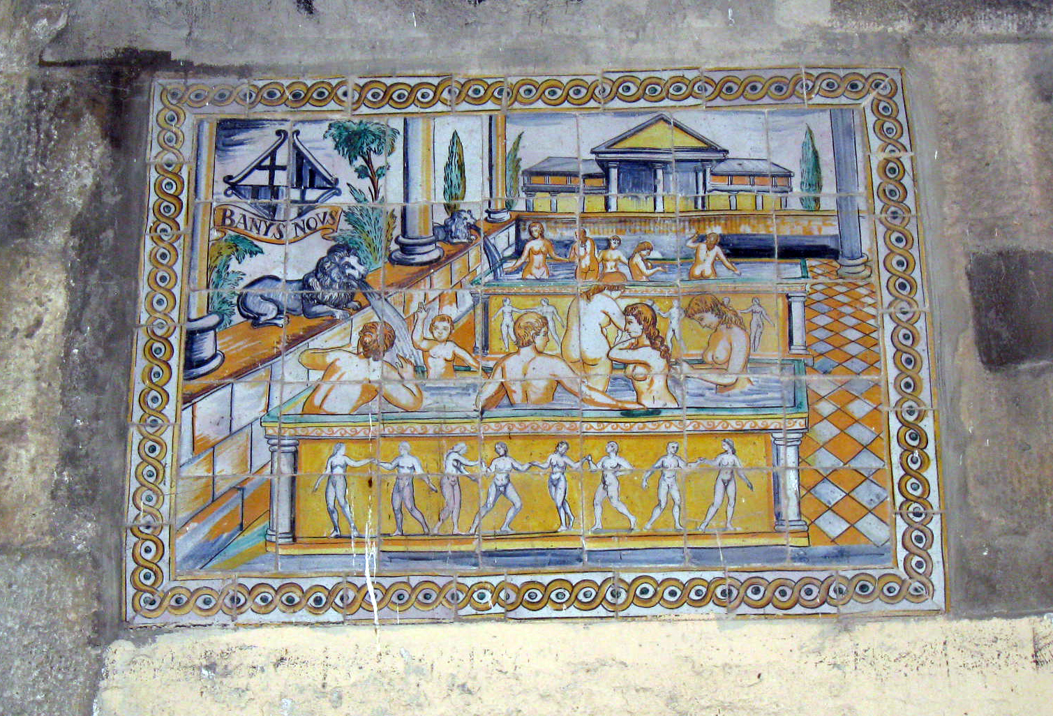 Banys Nous. C. Banys Nous, 17 (Barcelona)